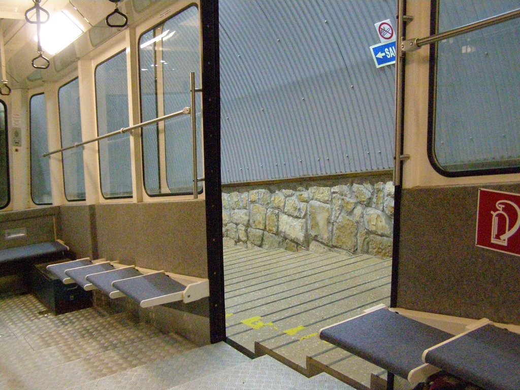 Funicular na xubida a Bulnes